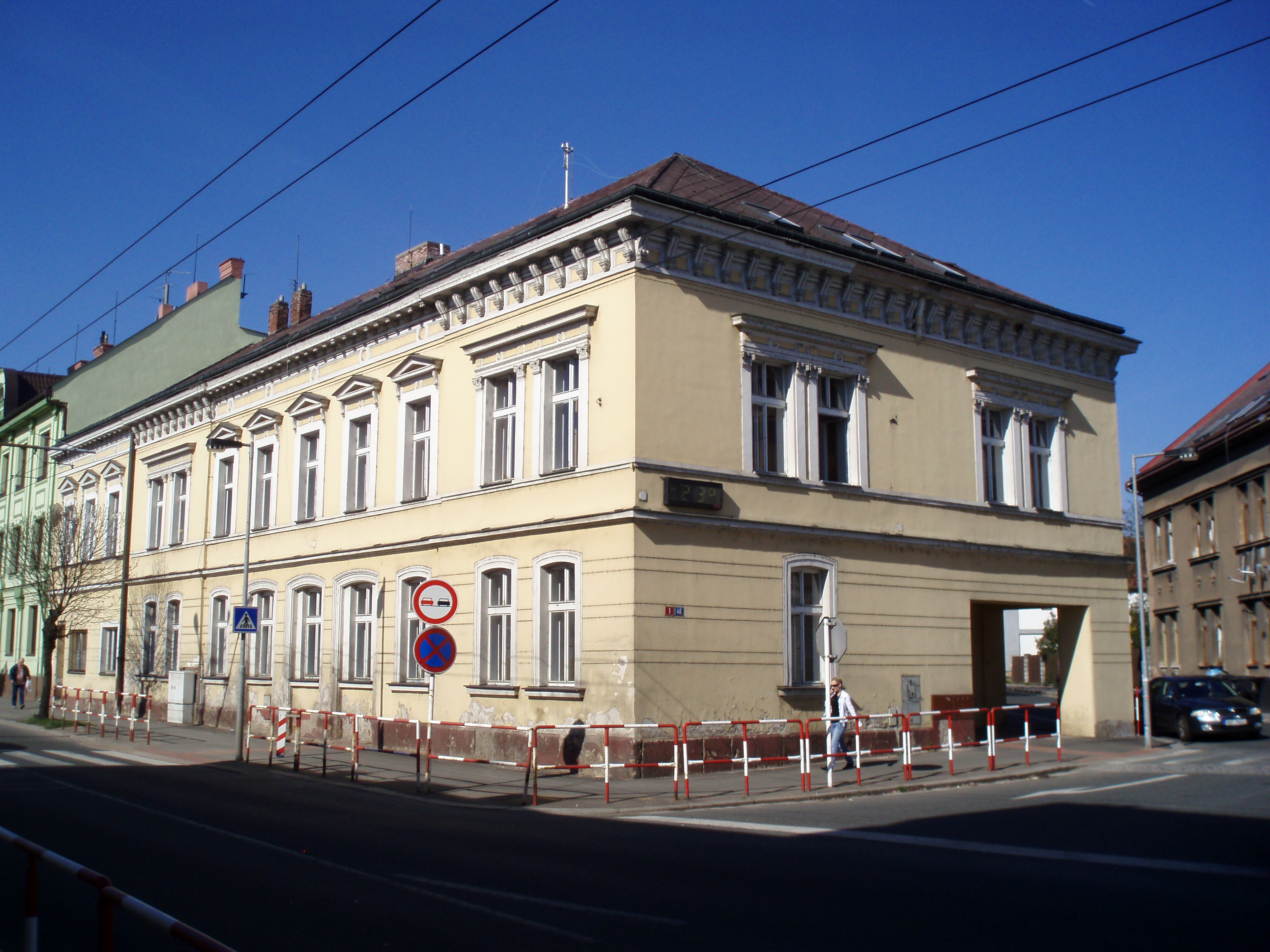 Pražská třída čp. 1